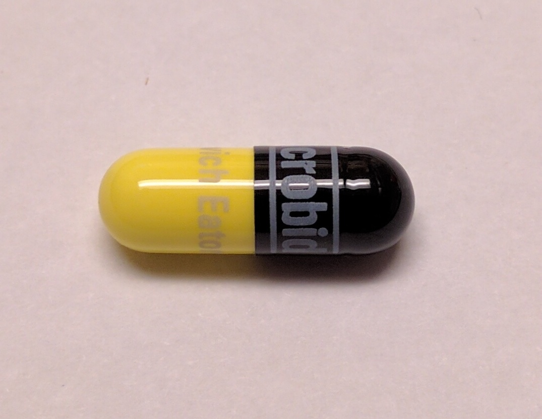 macrobid 100mg canada